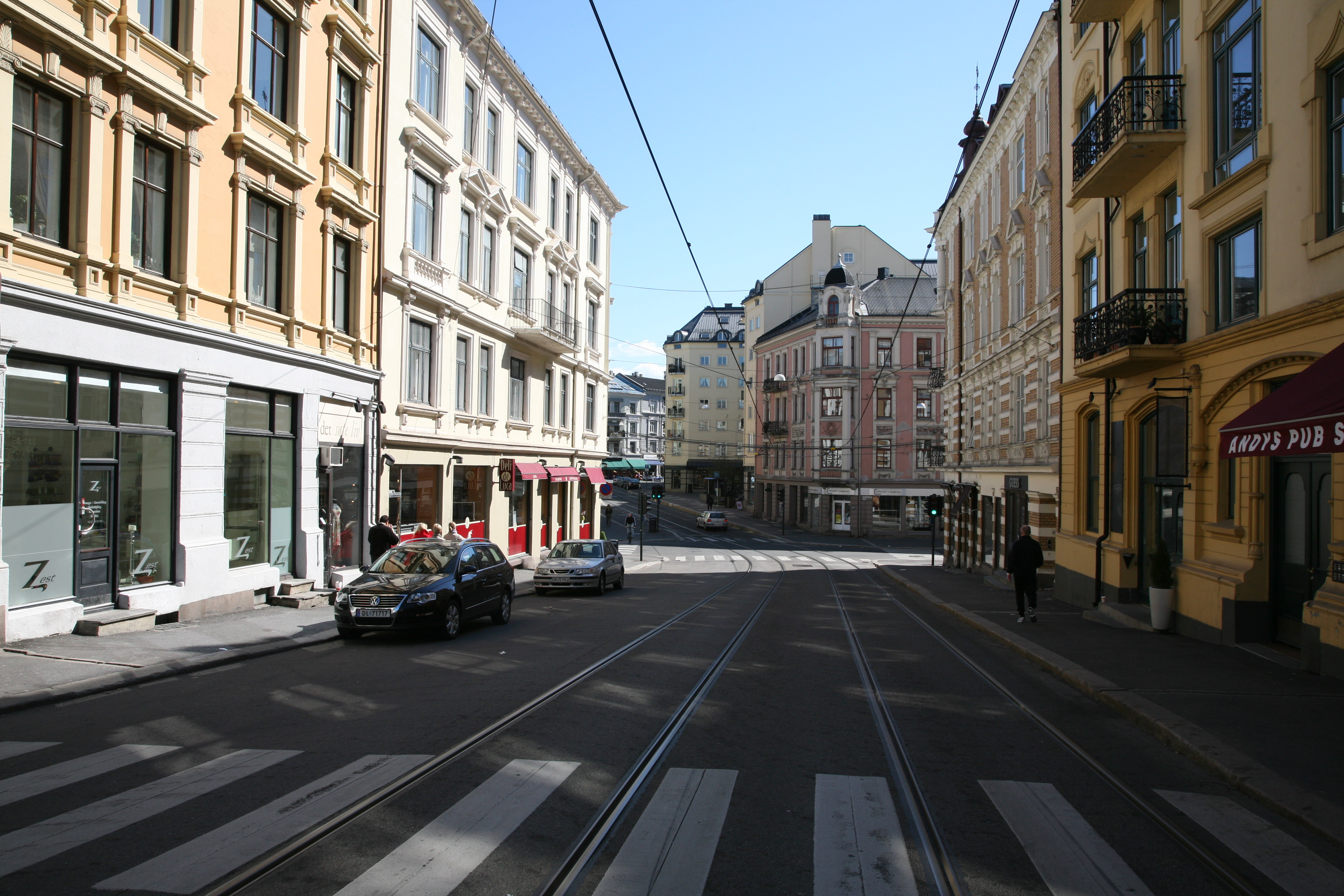 From Frognerveien in Oslo